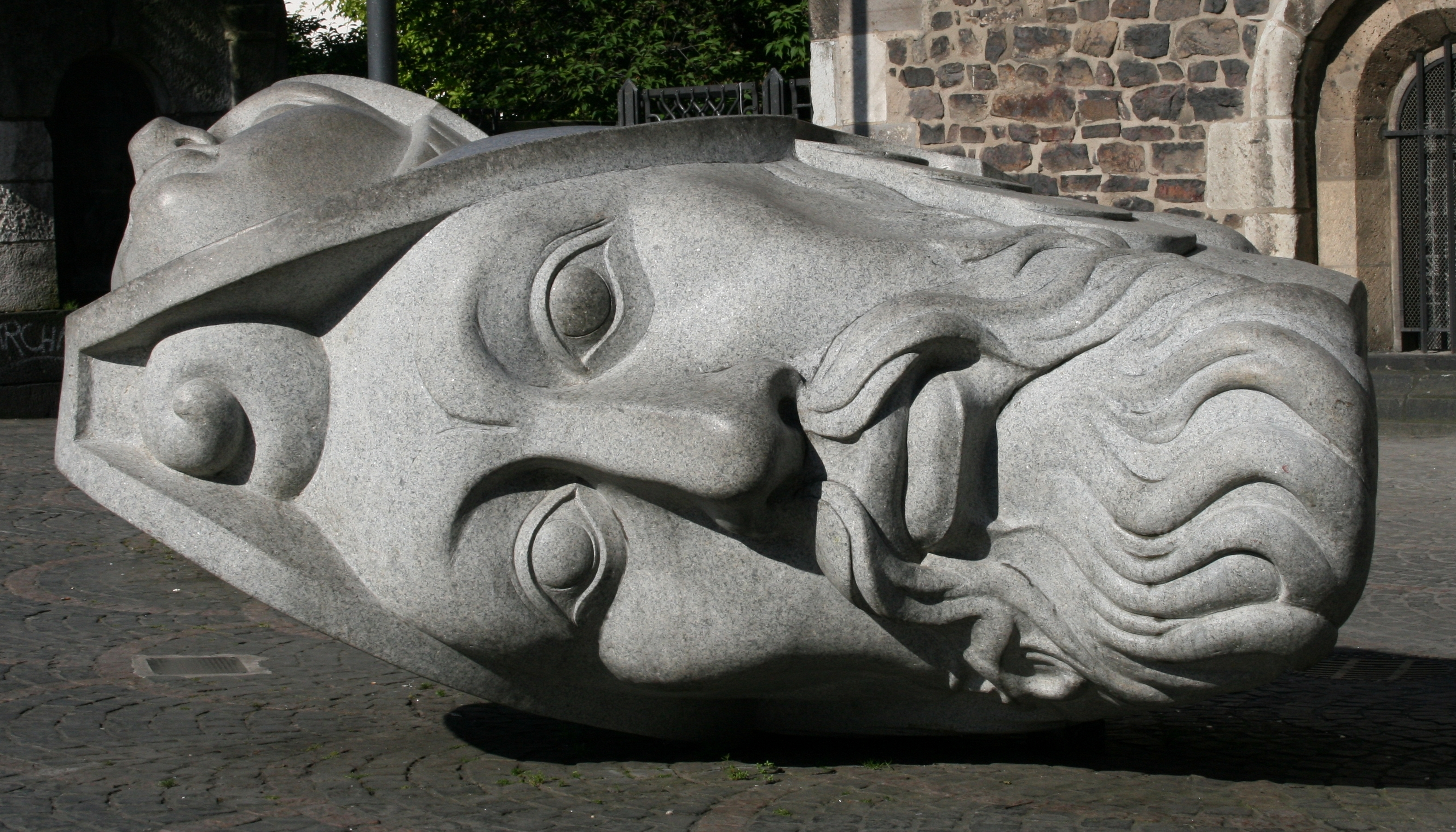 Florentius; Stadtpatron von Bonn Plastik vor dem Bonner Münster